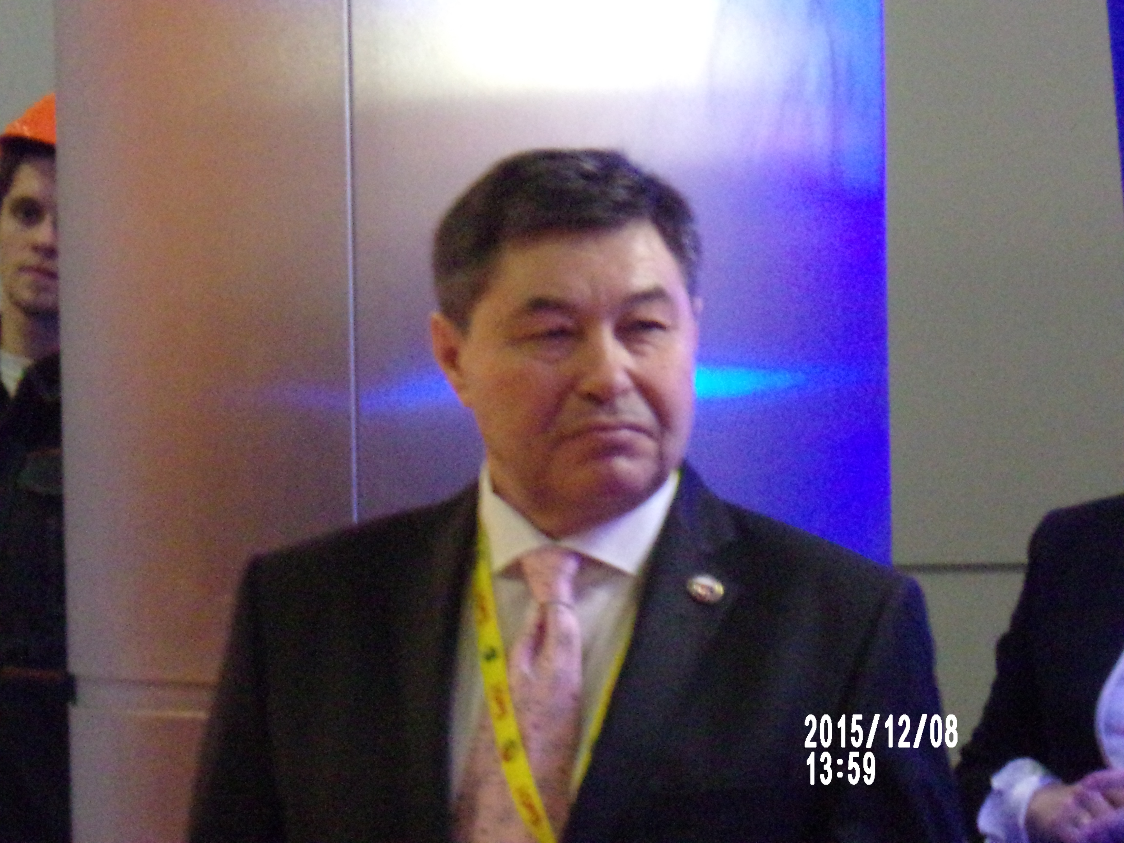 Ркуоводитель АСИЗ Игорь Рогожин на выставке БИОТ-2015